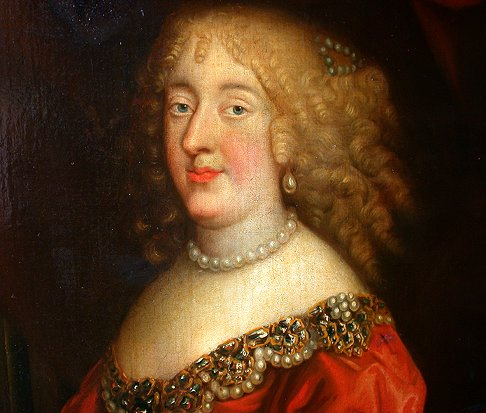 Anne-Marie Louise d'Orléans (1627-1793), duchesse de Montpensier, comtesse d'Eu, détail d'une copie d'après Jean Nocret, XVIIe siècle